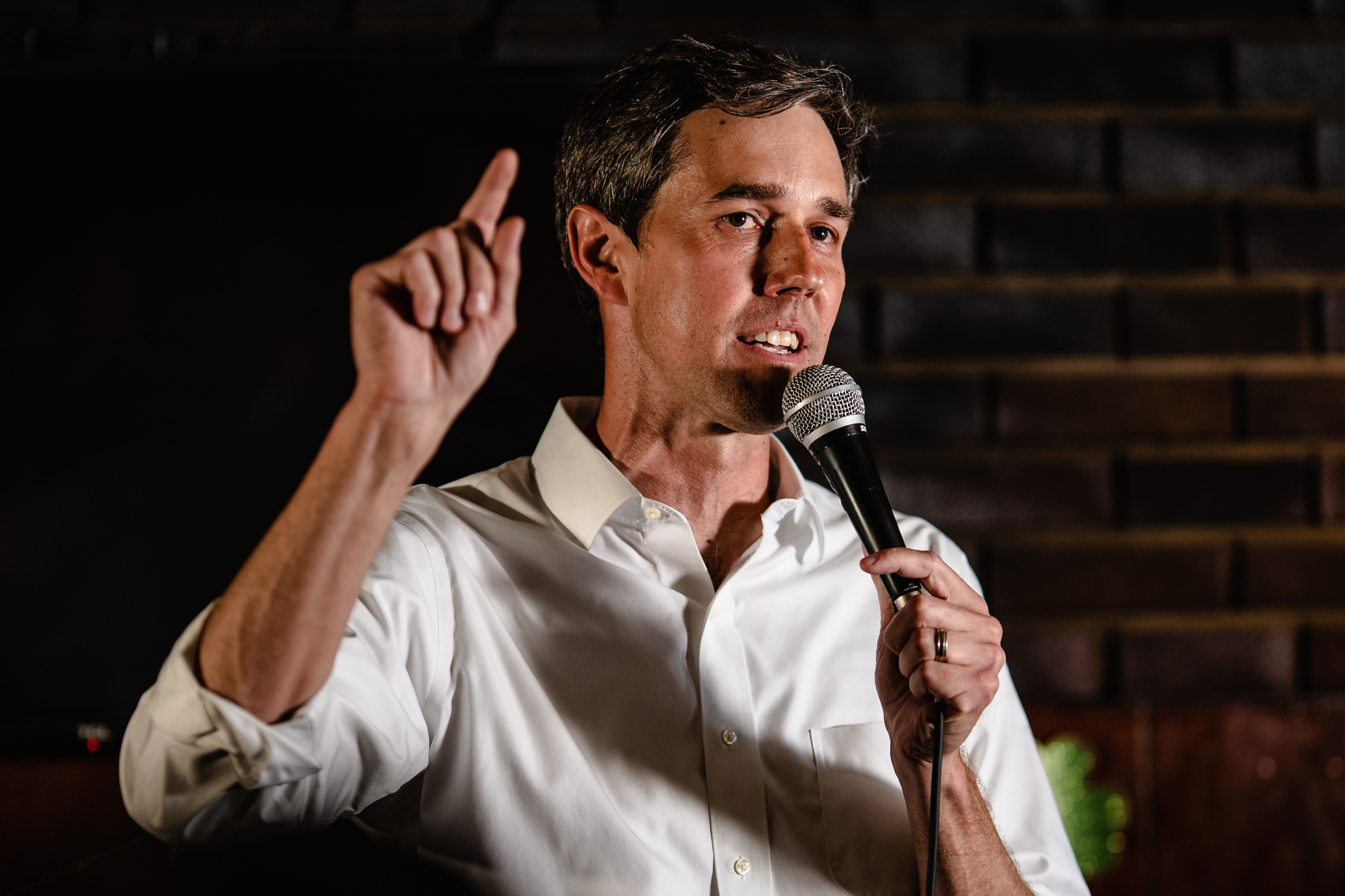 Beto O'Rourke in Cleveland